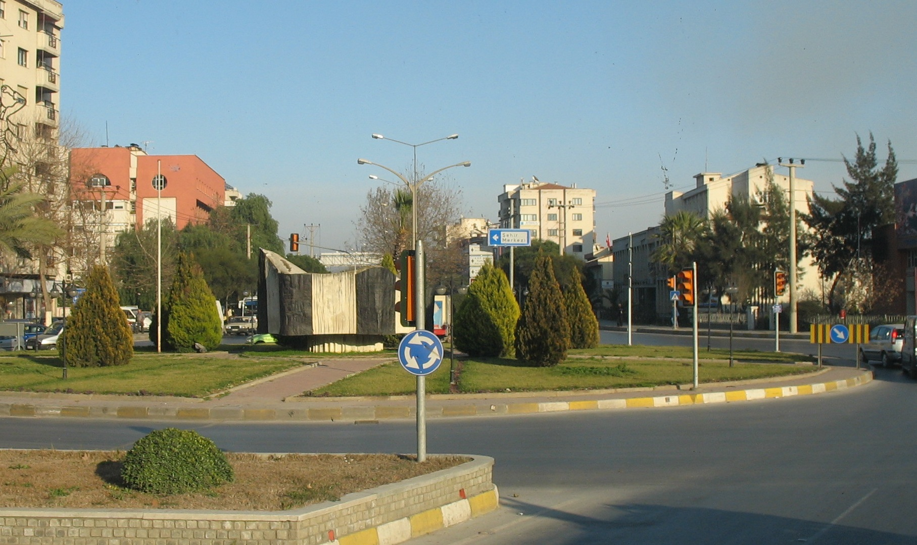 Aydın merkez